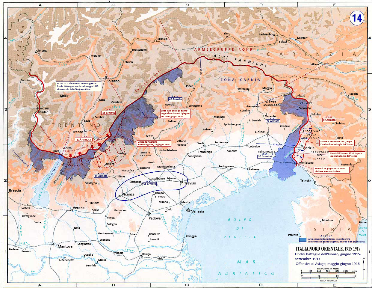 Mappa del fronte italiano della Grande Guerra.